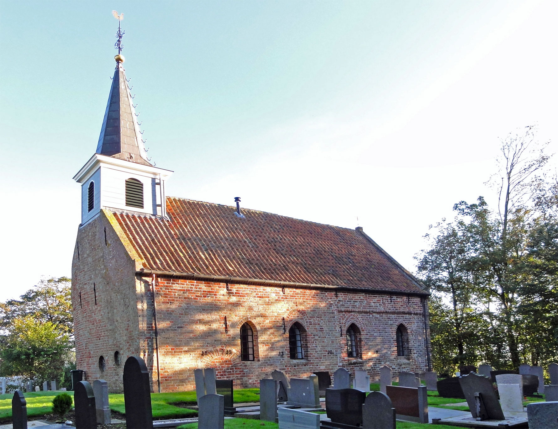 Mariakerk van Bornwird, rijksmonument